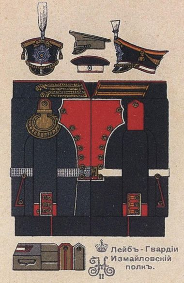 Форма обмундирования парадная лейб-гвардии Измайловского полка. 1910 год.